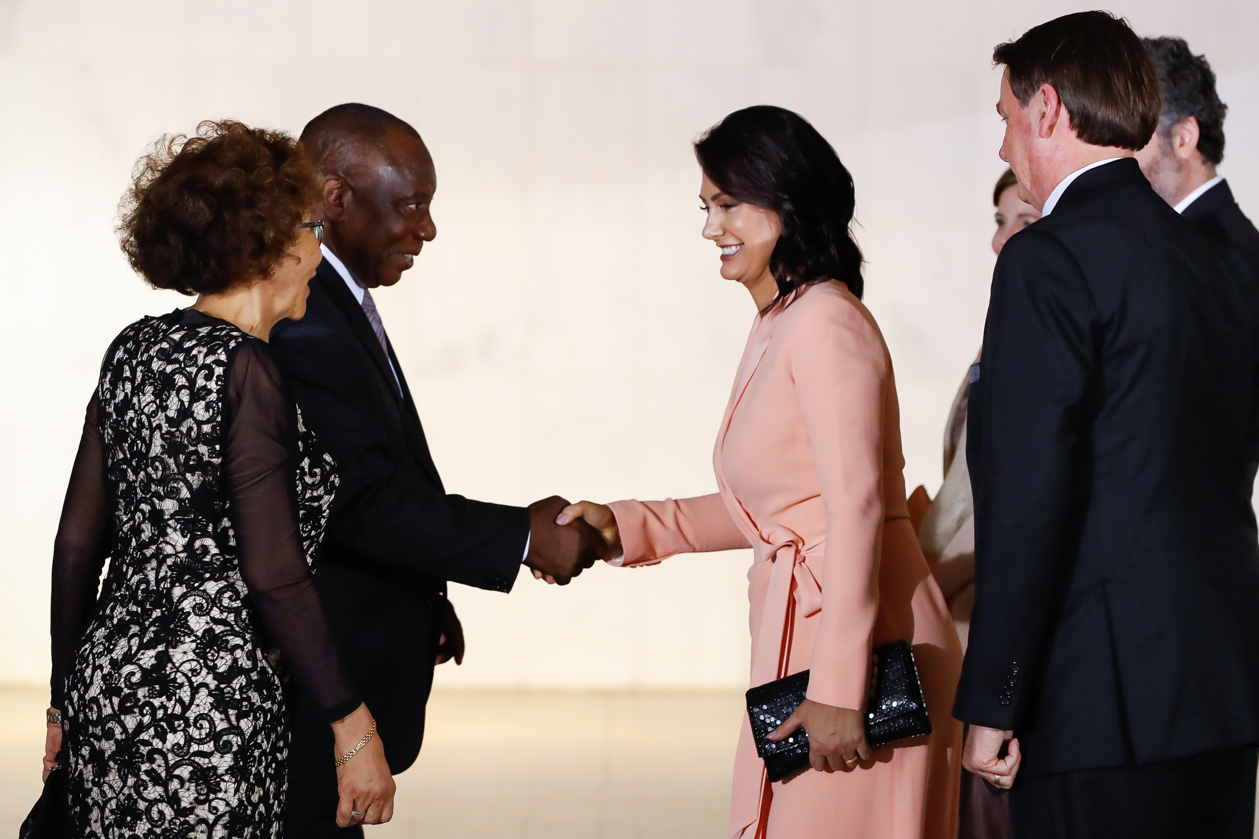 (Brasília - DF, 13/11/2019) Presidente da República, Jair Bolsonaro acompanhado da Primeira Dama, Michelle Bolsonaro recebem o Presidente da República da África do Sul, Cyril Ramaphosa e Senhora Tshepo Motsepe. Foto: Alan Santos/PR